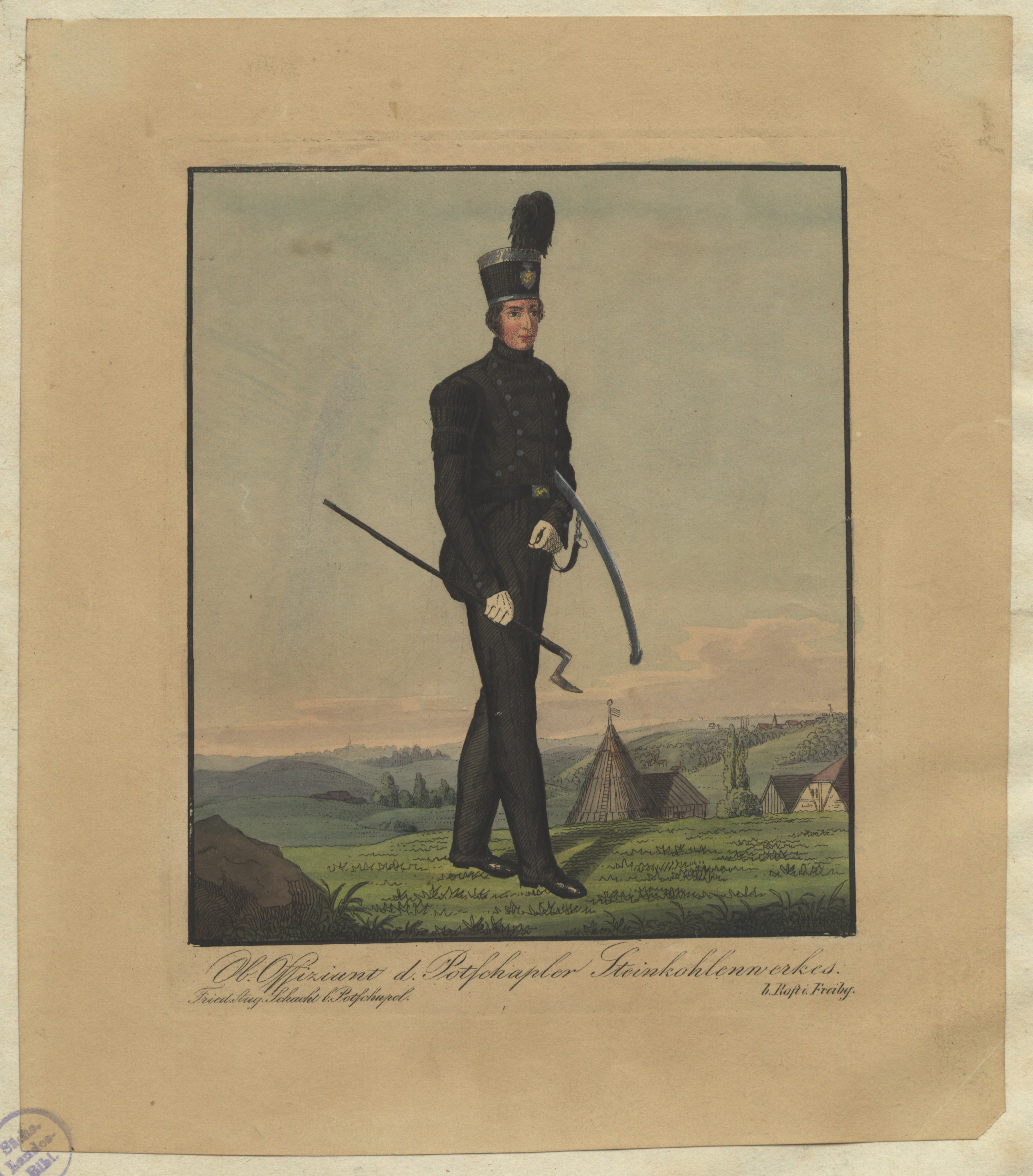 Ob. Offiziant d. Potschapler Steinkohlenwerkes. Fried. Aug. Schacht b. Potschapel aus: G. E. Rost: Trachten der Berg- und Hüttenleute im Koenigreiche Sachsen. Verlag [Rost], [Freiberg]